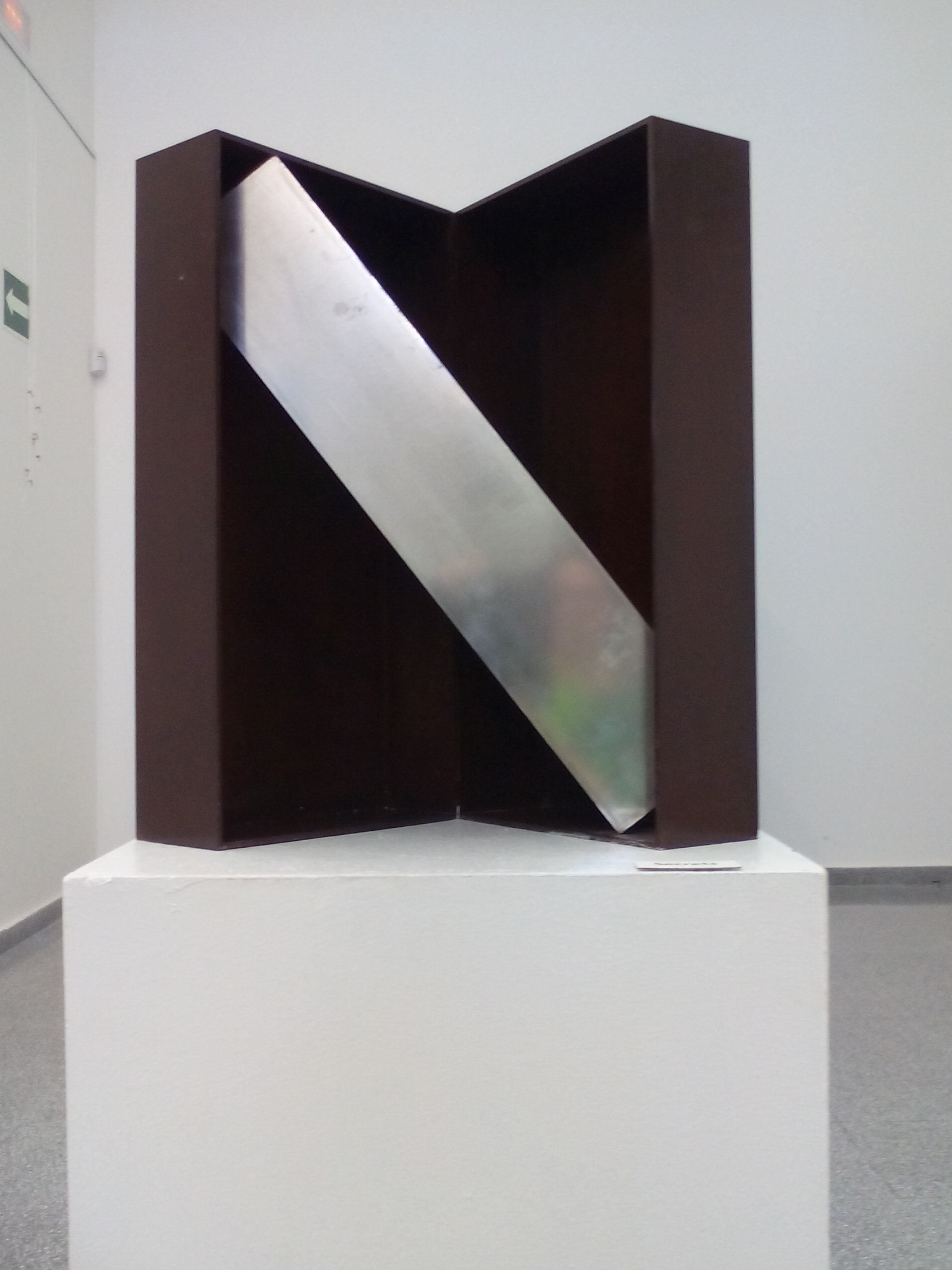 Escultura Elisa Arimany